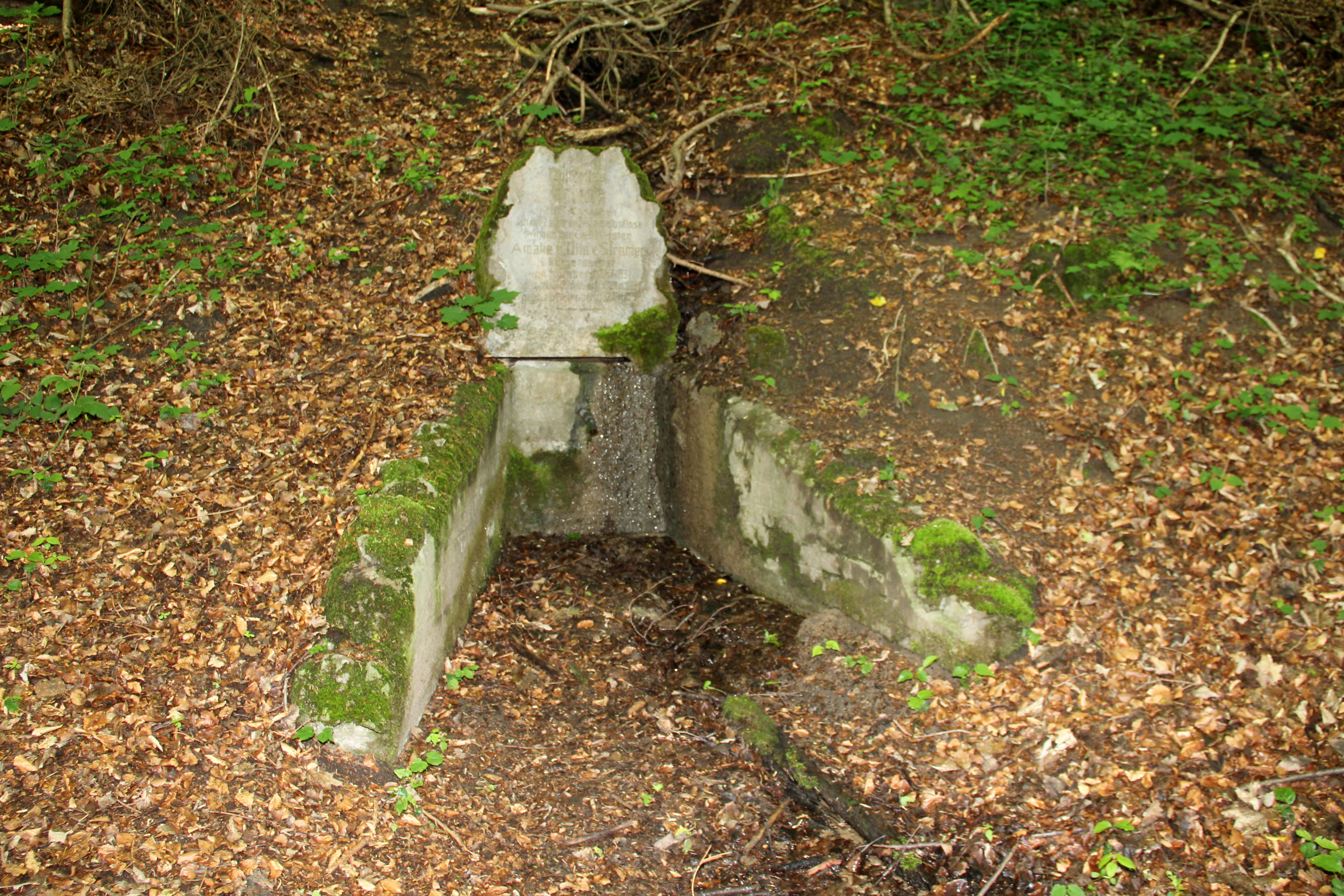 Dolderles-Brünnle in der Nähe der Sophienquelle von Grünsberg